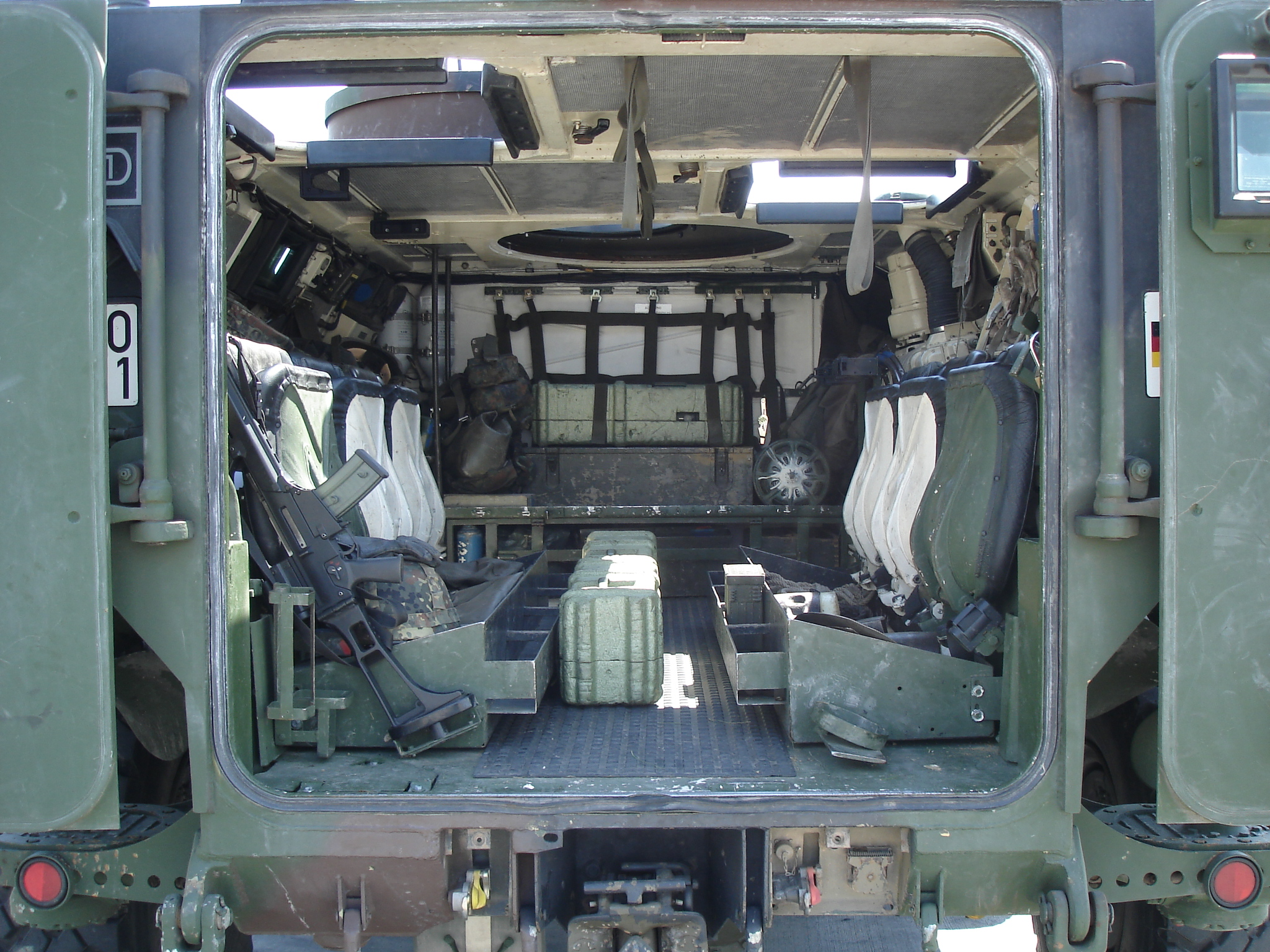 Transportraum des TPz Fuchs für maximal 6 Personen. Variante Pionier.